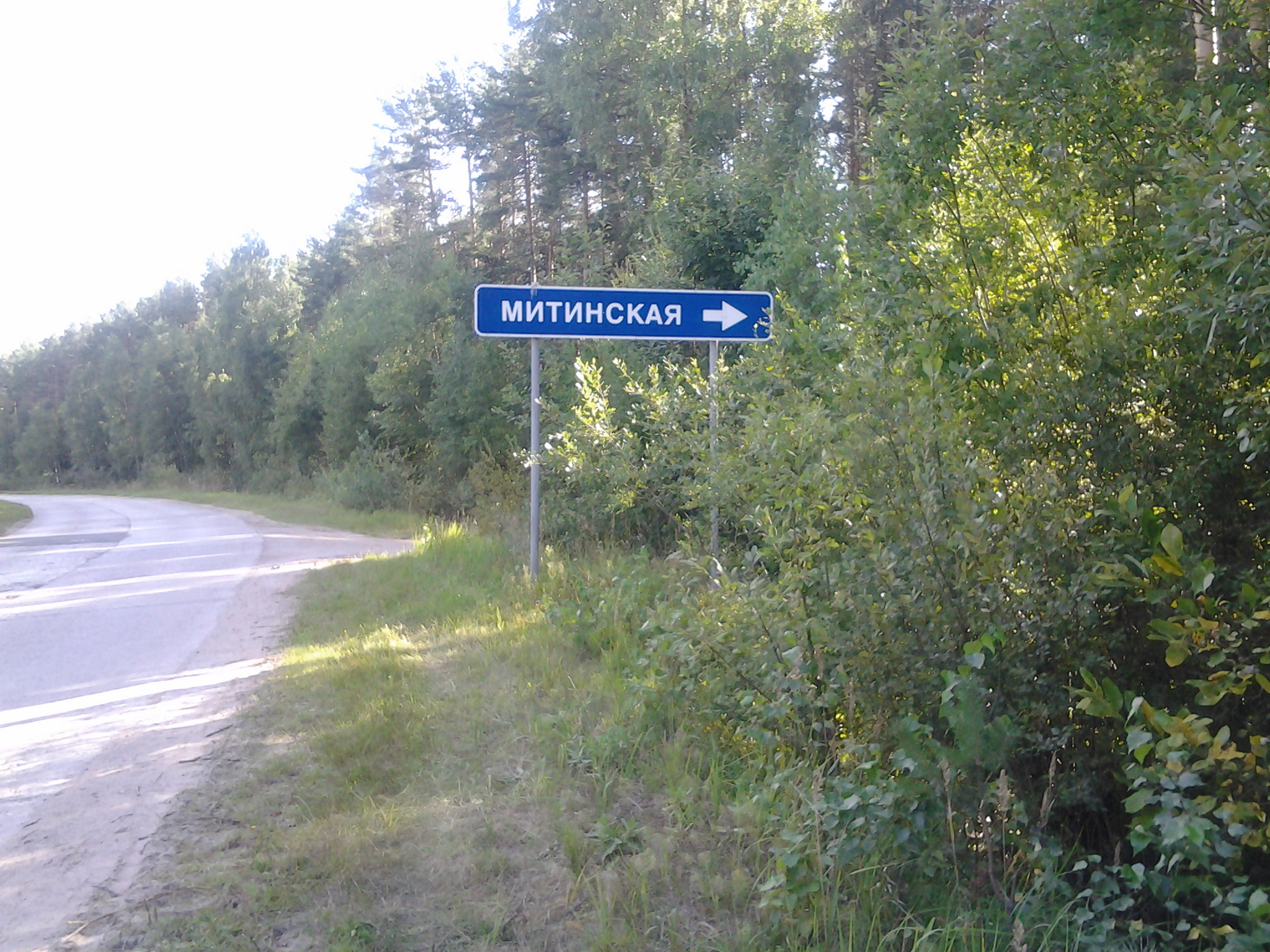 Дорожный знак поворота на д. Митенскую, написанный с ошибкой